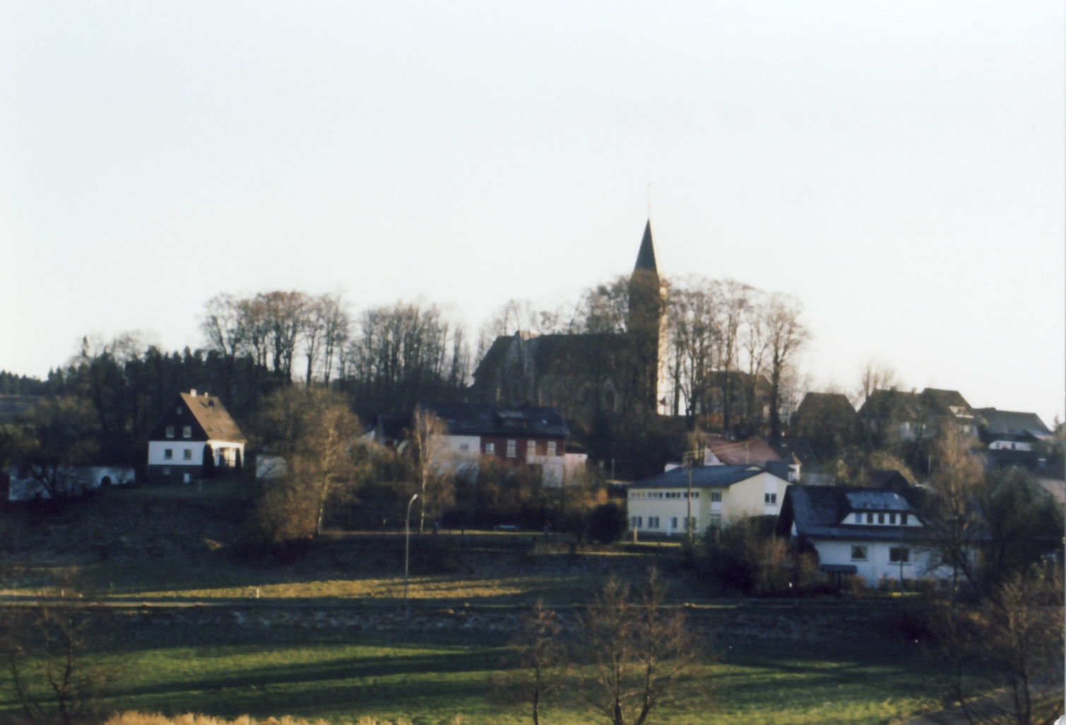 Belmicker Kirche mit 2 Schulen